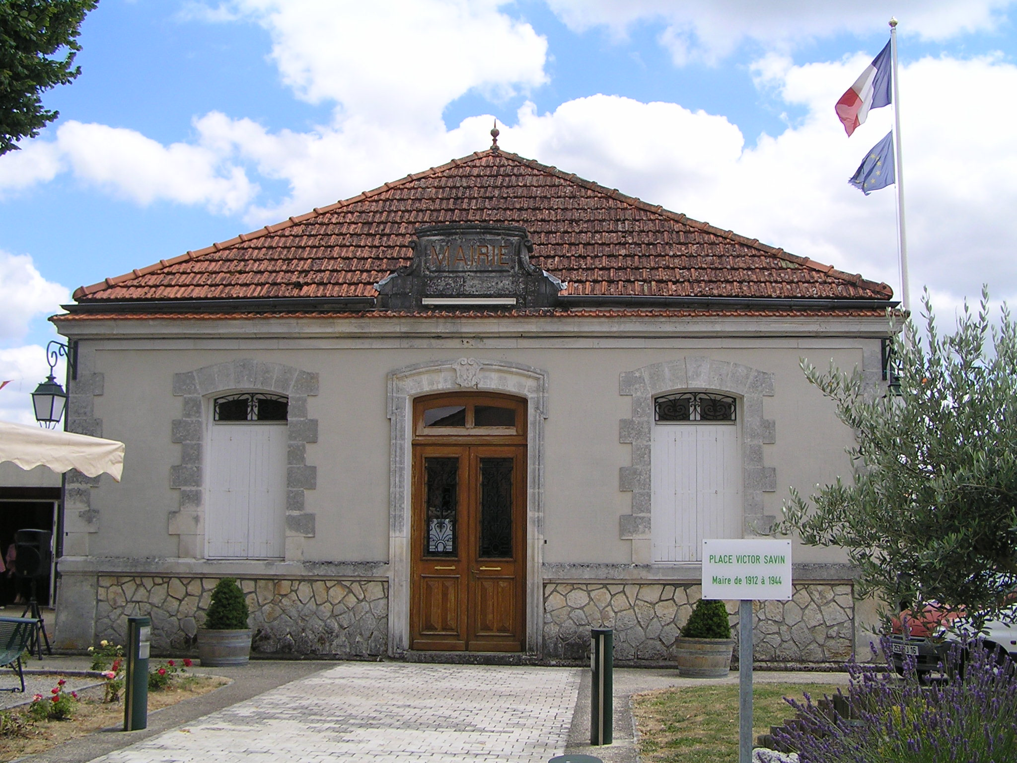 mairie de Criteuil-la-Madeleine